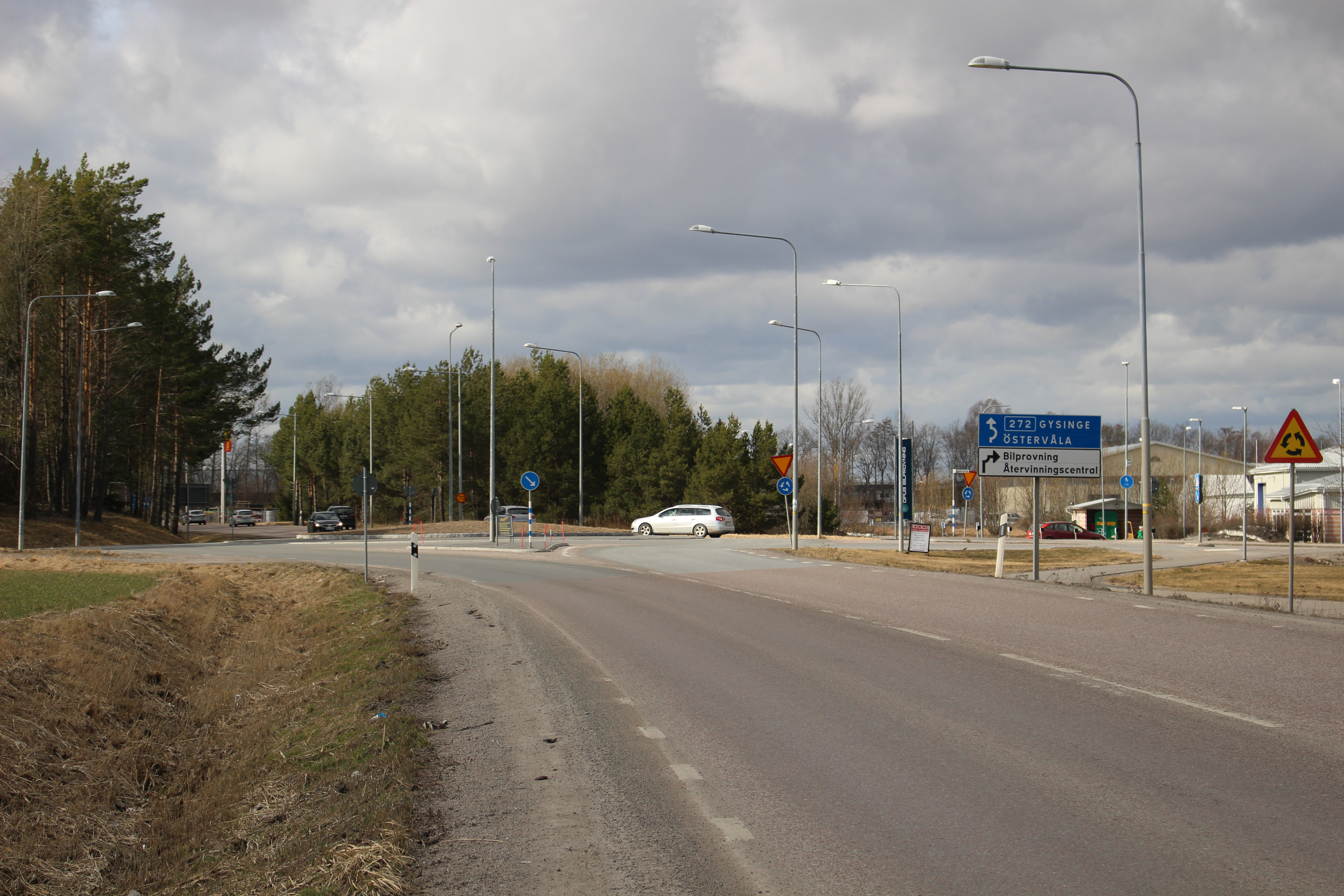 Länsväg 272 mot nordväst i Librobäck.